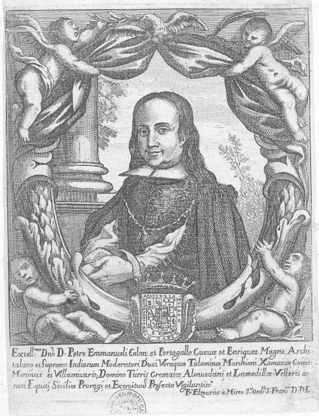 Pedro Manuel Colón de Portugal, estampa anónima. Inscripción: Excellm.ø Dno. D. Petro Emmanueli Colon et Portogallo Cuevae et Enriquez Magno, Architalasso et Supremo Indiarum Moderatori Duci Veraquae, Talaminae, Marchioni Xamaicae Comiti Menincis et Villamicaris, Domino Turris Crematae Almuedani et Lamedillae Velleris aurati Equiti, Siciliae, Proregi et Exercituus Prefecto Vigilantiss.º Fr. Elzearius a Mirto. 3. Ordis. S. Franci. D. D. D. Biblioteca Nacional de España.